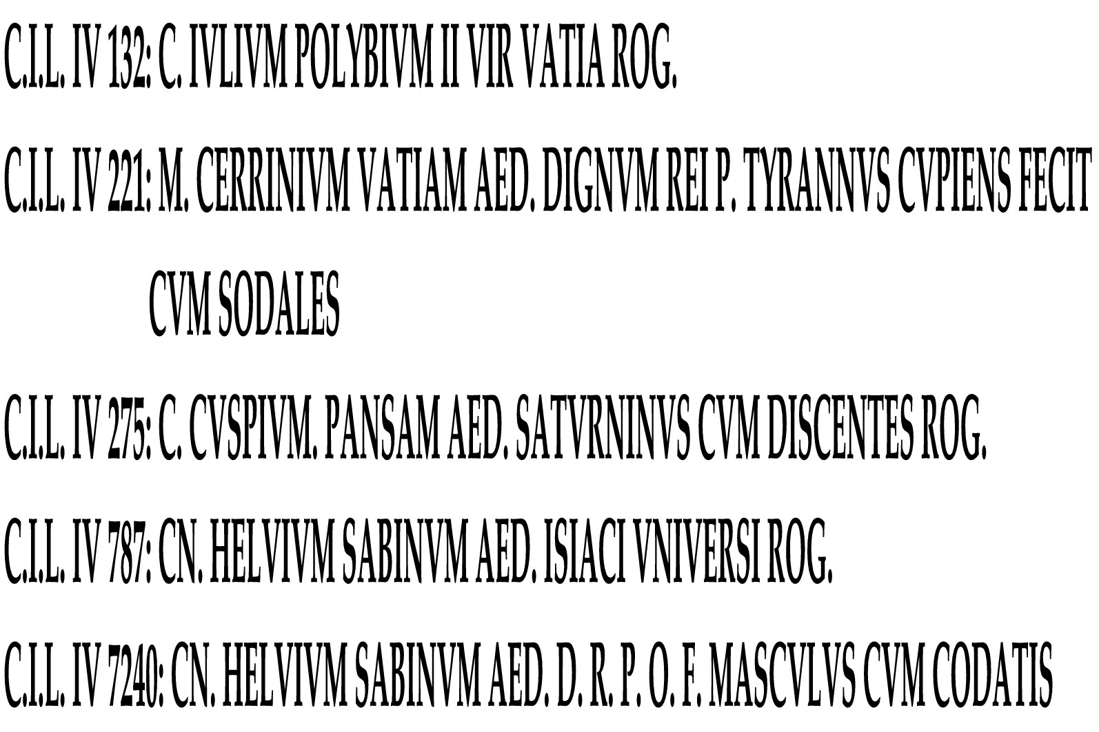 Inscripción pompeyana